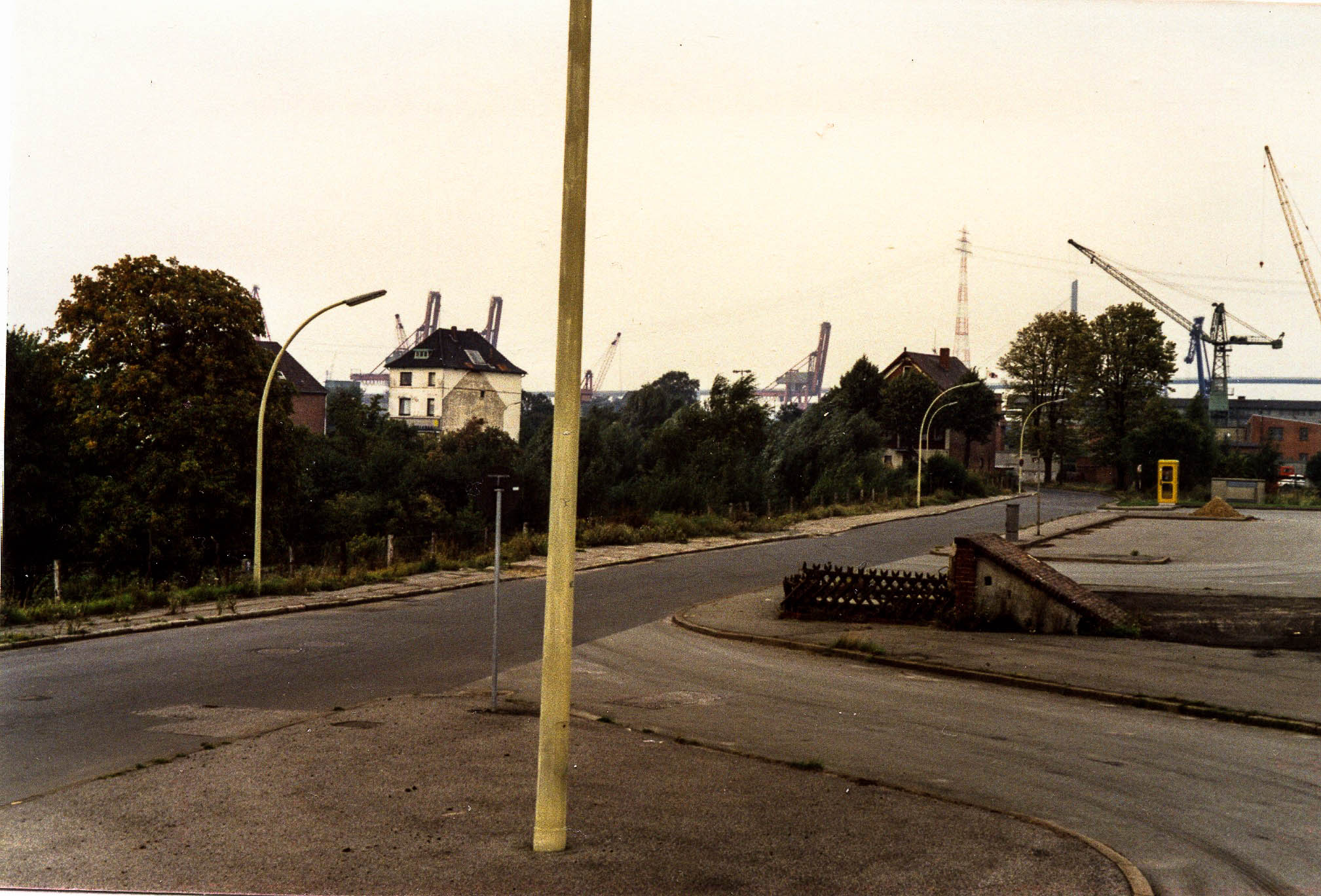 Altenwerder unmittelbar vor dem Umbau 1986 vom Anleger aus gesehen